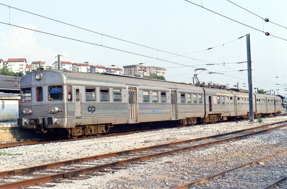 2164 en Coïmbra-B.